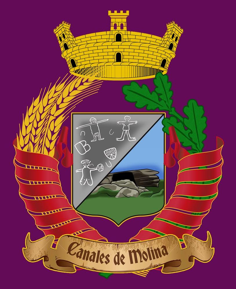 Descripción escudo: Sobre fondo carmesí del pendón de Castilla, escudo tronchado con las inscripciones de la Peña del Moro en su parte superior, símbolo de los antiquísimos pobladores, y en su parte inferior la Peña de las Mujeres, en honor a la abnegación de las que durante siglos se ocuparon de abastecer de agua a la población. Flanqueado por espigas de trigo y hojas de roble marojo, símbolos de los paisajes del término, y coronado por un castillo, por la bravura en la defensa de sus valores y tradiciones.